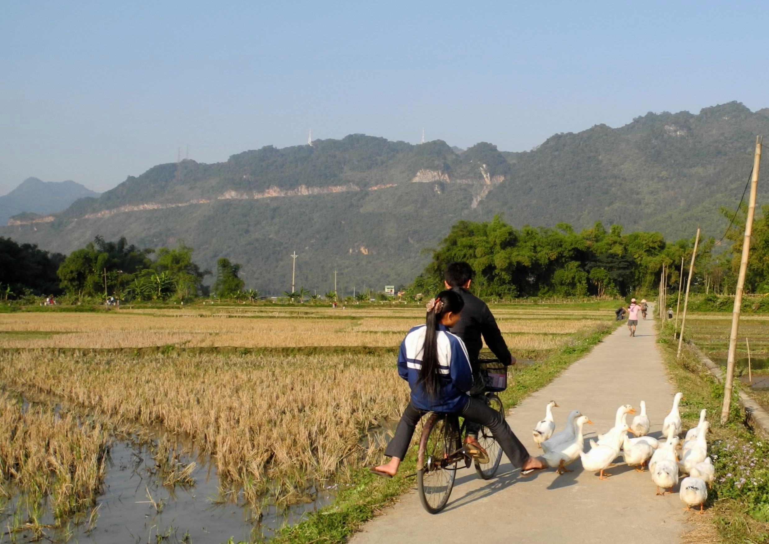 Mai Chau-Entenschar mit Mofa,Reisfelder